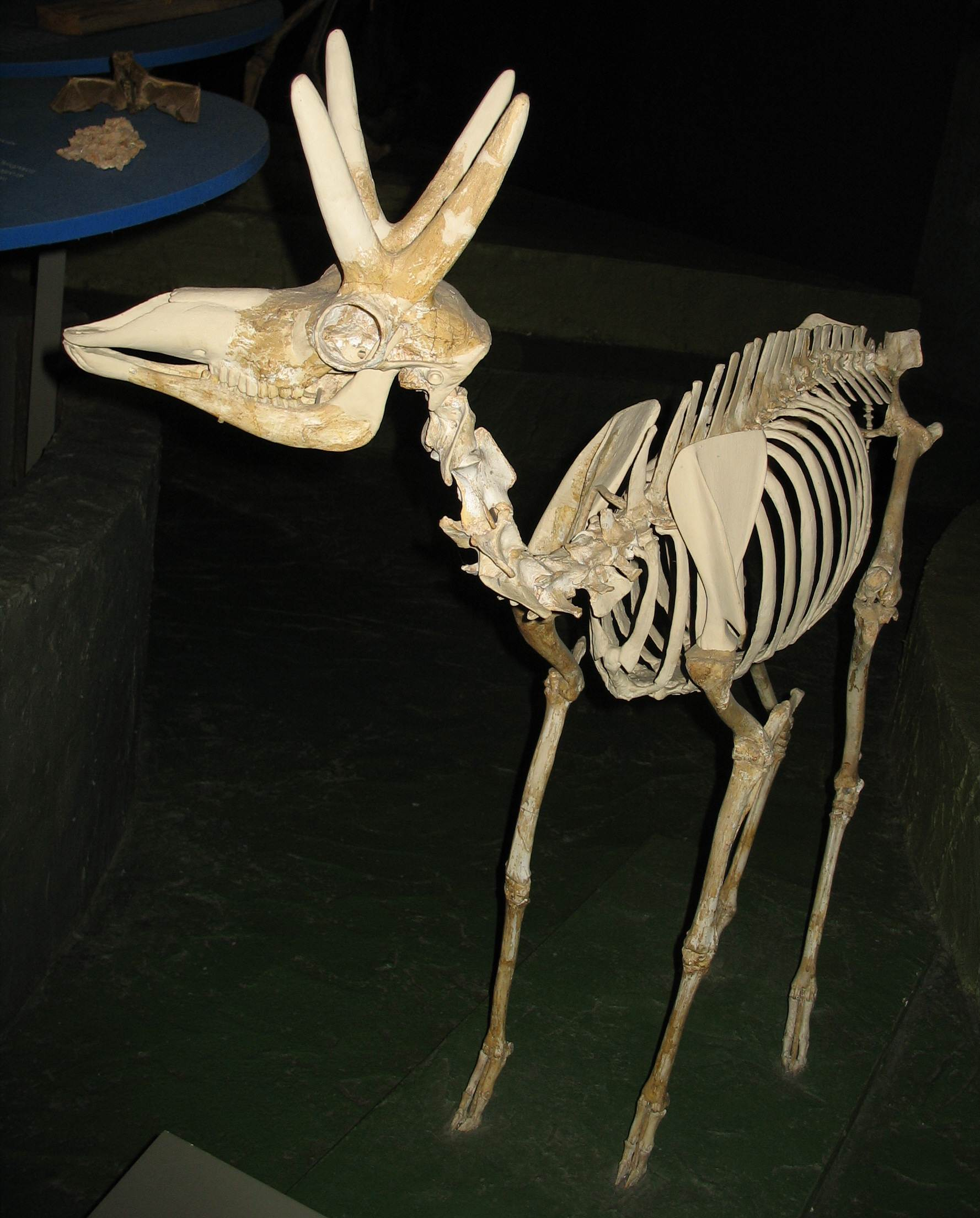 Stockoceros onusrosagris